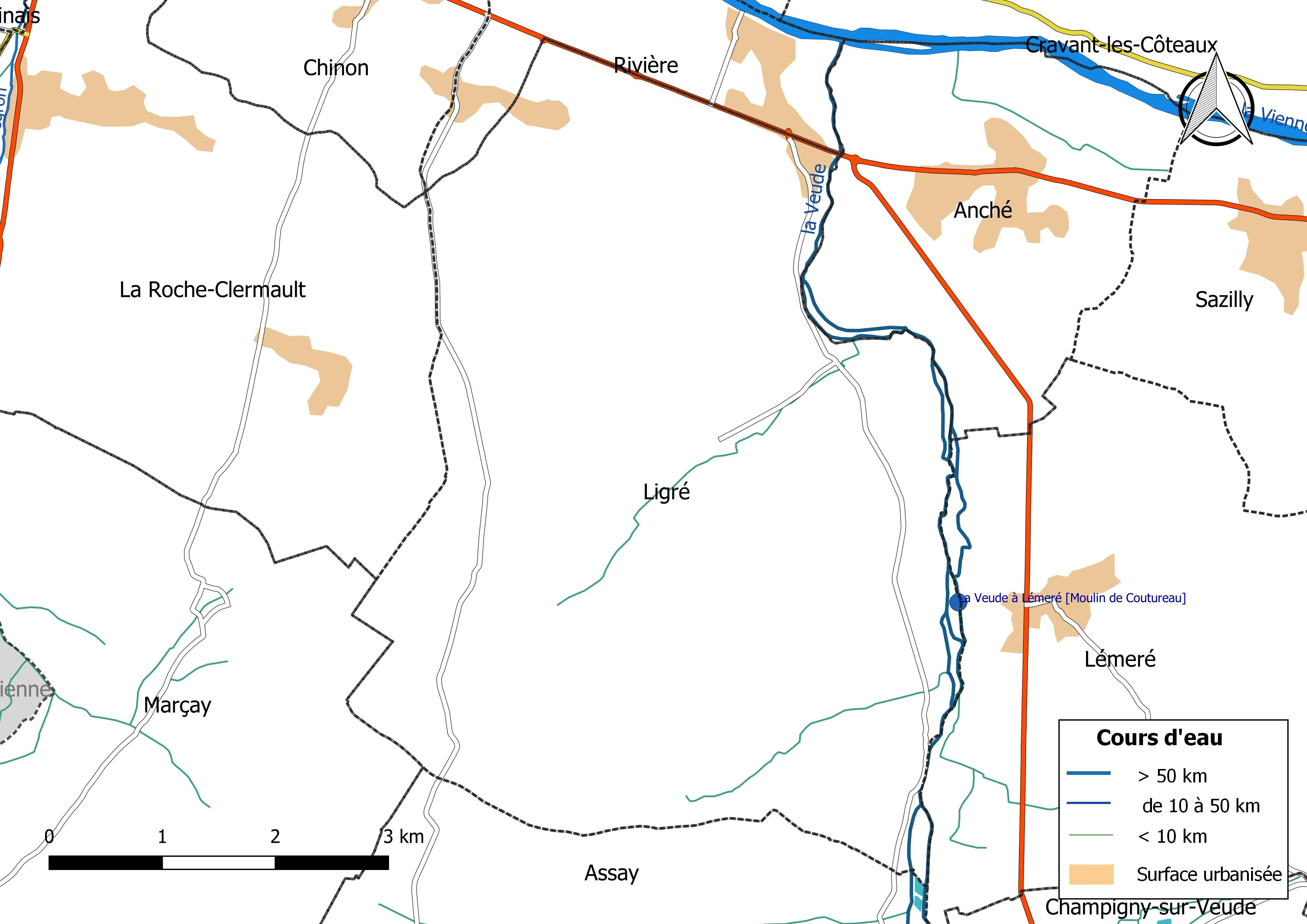 Carte du réseau hydrographique de la commune de Ligré (France).